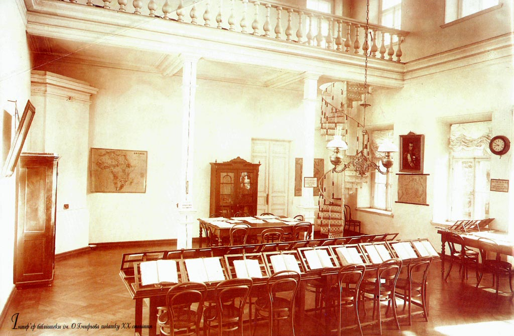 Інтер’єр бібліотеки початку ХХ ст.